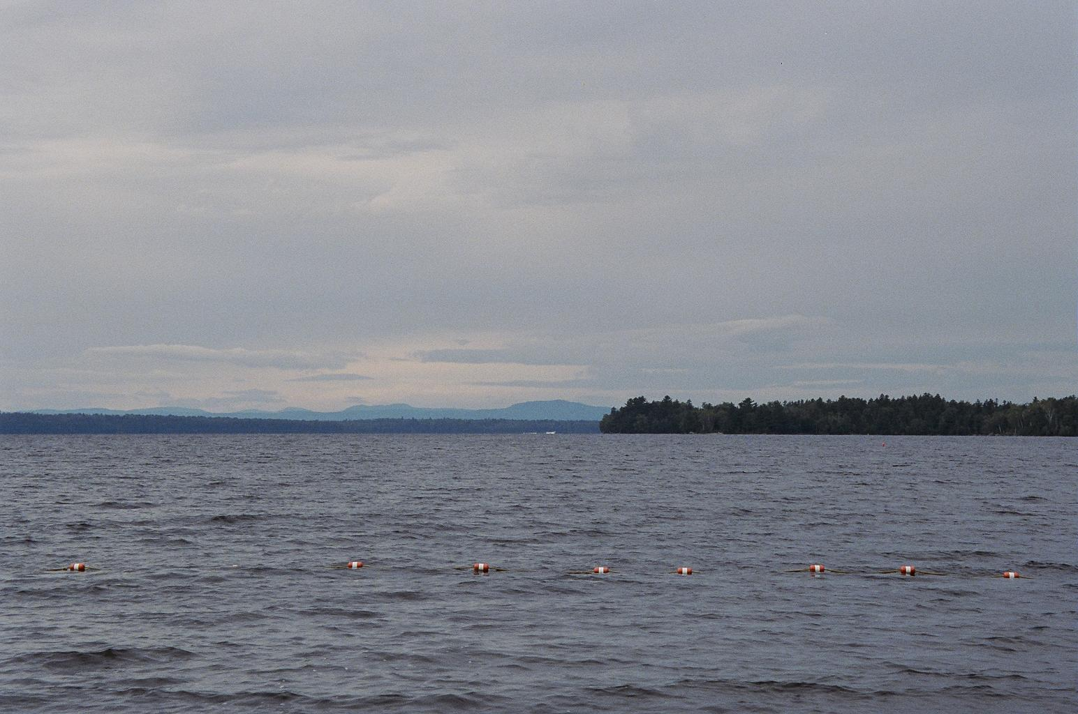 lily bay state park